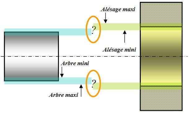 schéma personnel.